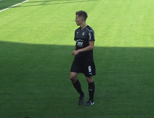 Christoph Göbel